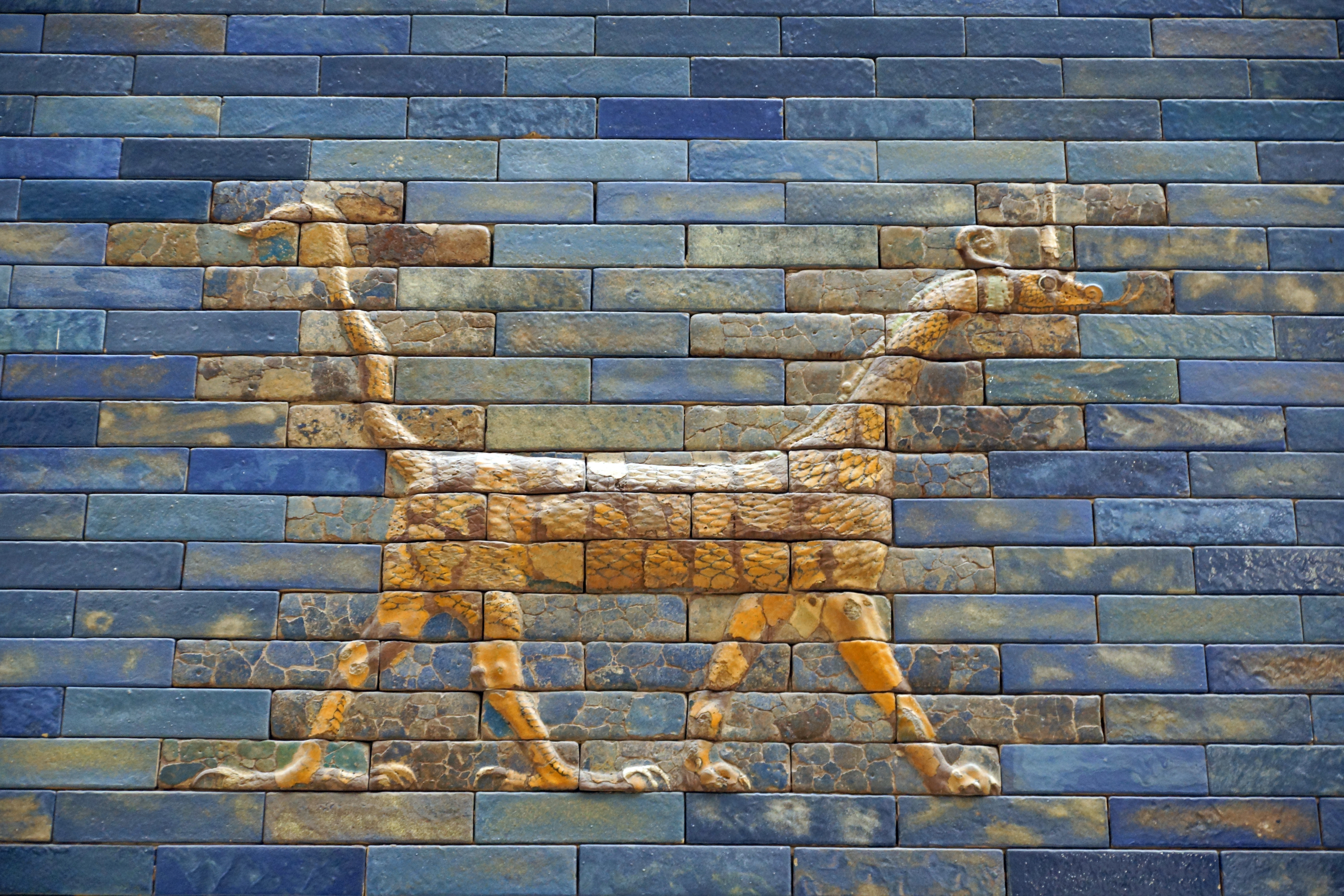 2012-10-10 10-13 Berlin 313 Pergamon Museum, Ischtar Tor, Detail